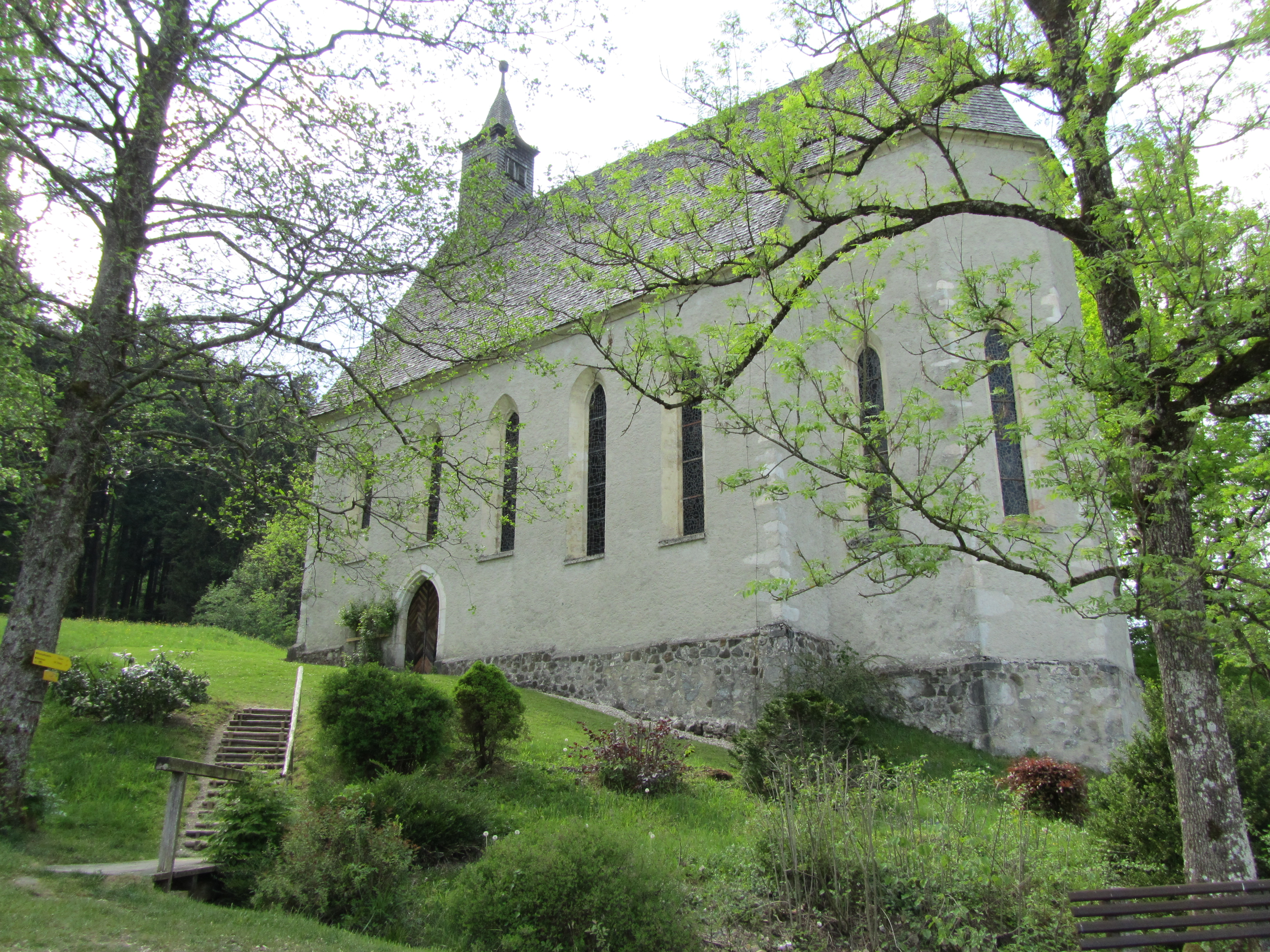 Kath. Filialkirche hl. Martin, Konradskirche, Oberwang